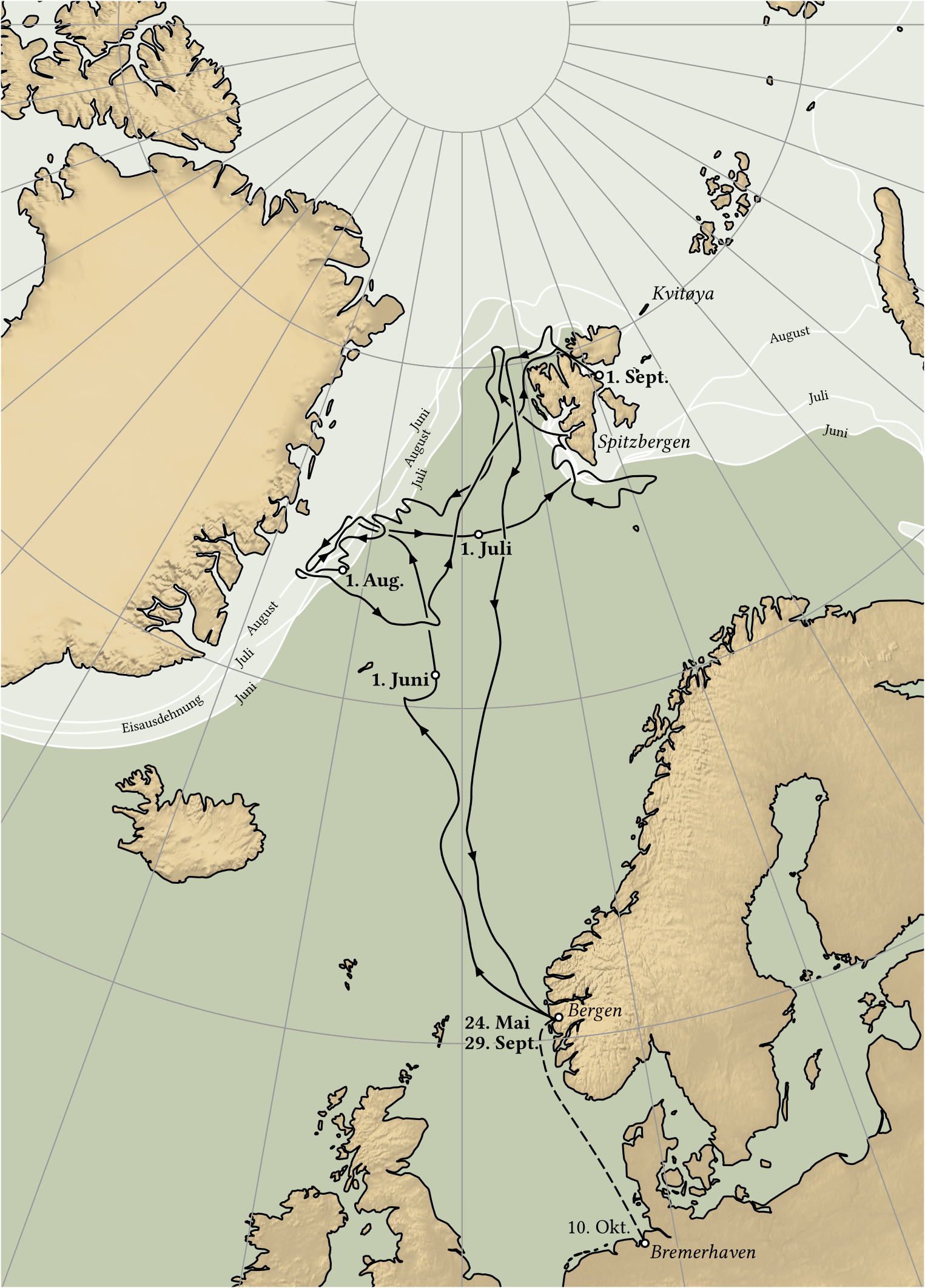 Route der ersten deutschen Arktisexpedition unter Karl Koldewey auf dem Frachtsegler "Grönland" vom 24. Mai 1886 bis 28. September 1886.